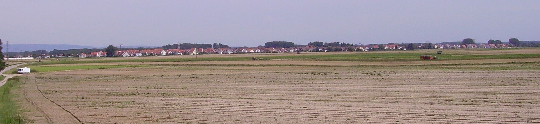 view of Waldsee, Germany